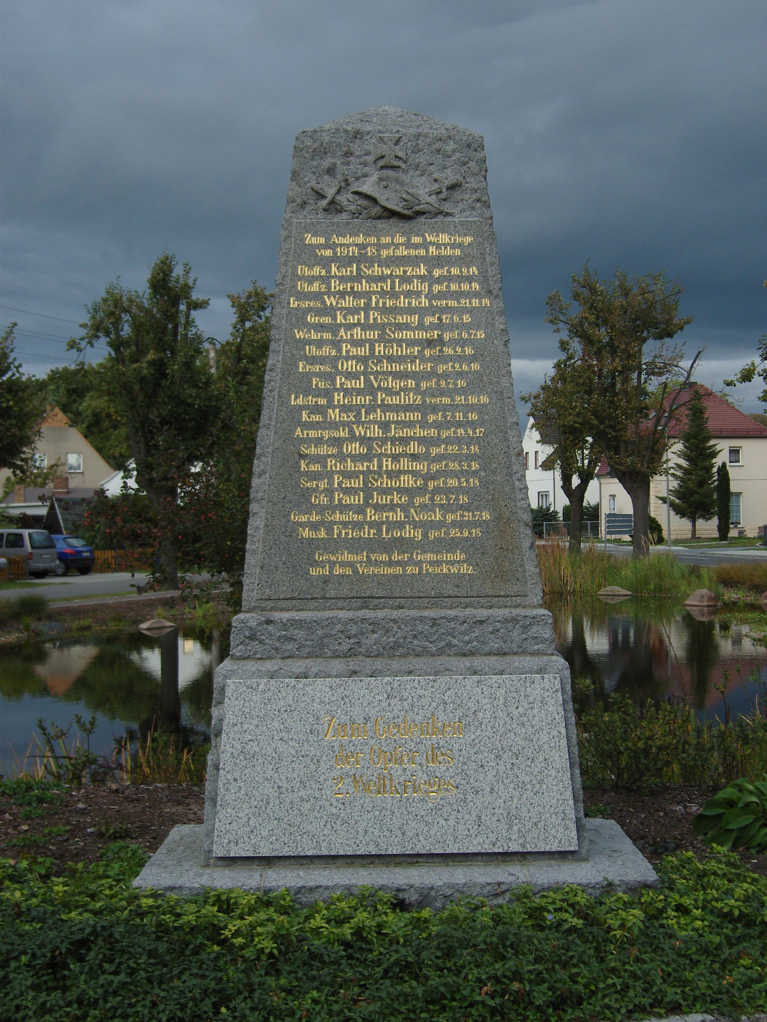 Kriegerdenkmal für die Gefallenen des Ersten Weltkriegs im Senftenberger Ortsteil Peickwitz mit Ergänzungstafel an die Gefallenen des Zweiten Weltkriegs